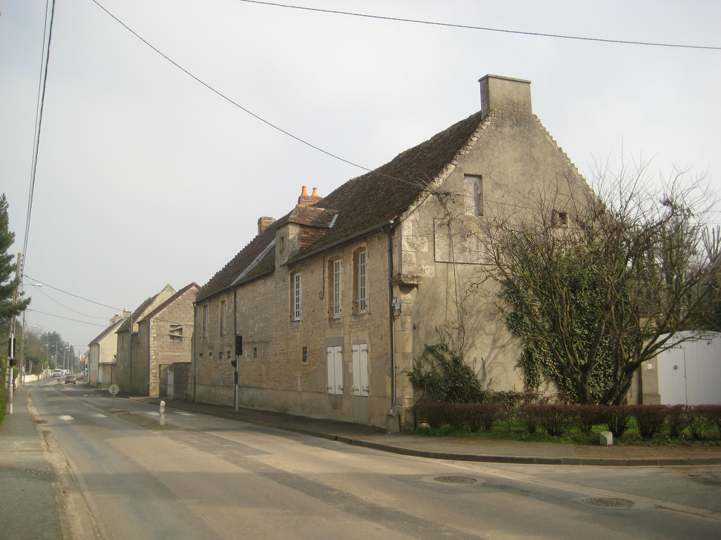 ancienne ferme du hameau de la Folie à Caen